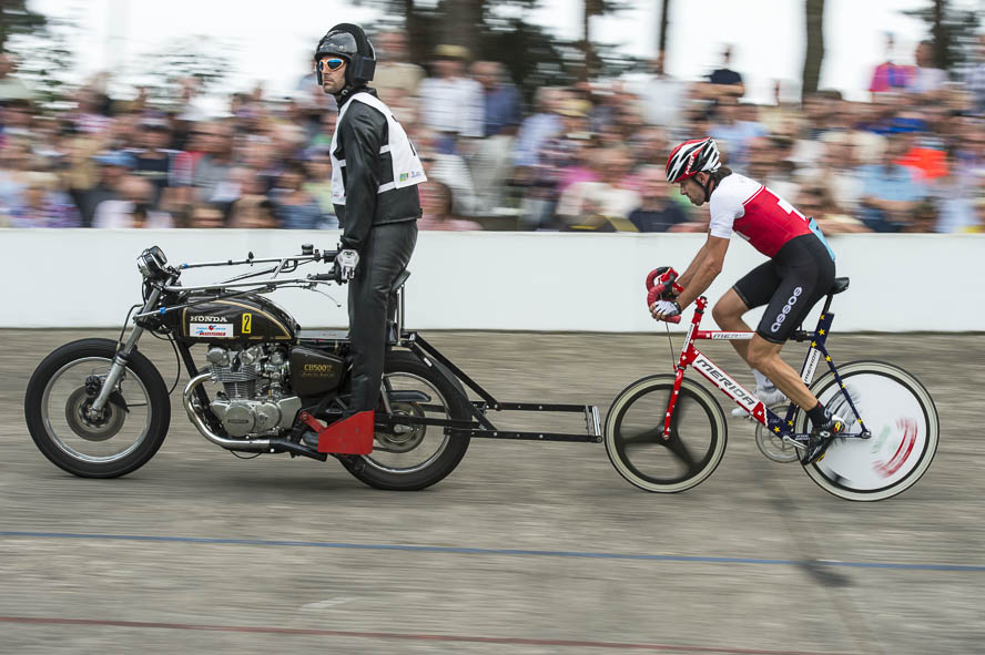 André Dippel,1. Vorlauf,EM,Europameisterschaft der Steher,Giuseppe Atzeni,Radrennbahn Nürnberg,Radrennen,Radsport,Reichelsdorfer Keller,Stayer,Steher,Steherrennen